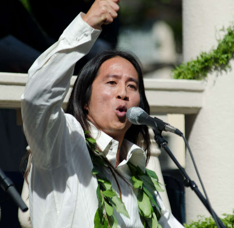 Hawaii_Inauguration_2010-68